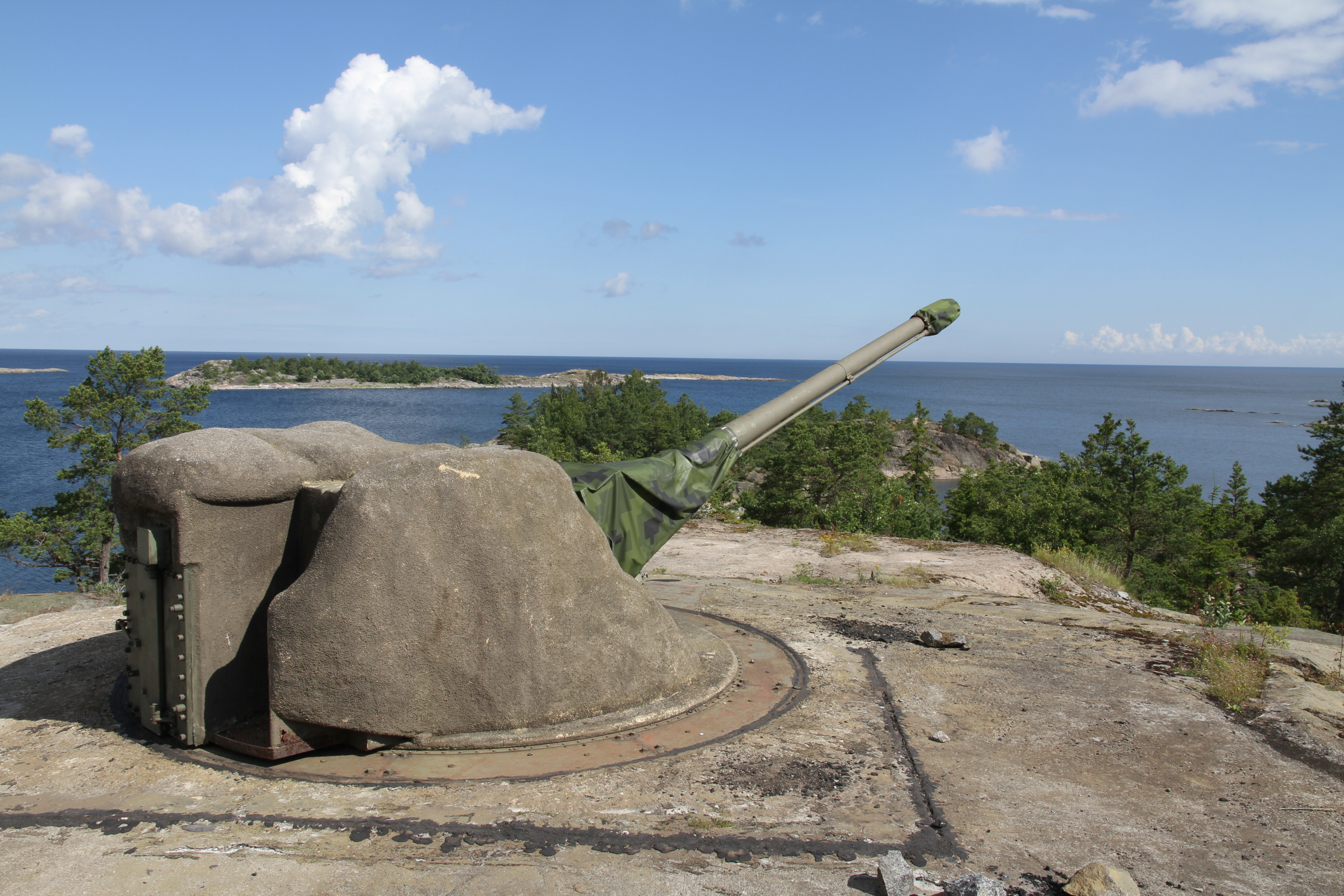 Batteri Arholma 14 juli 2012